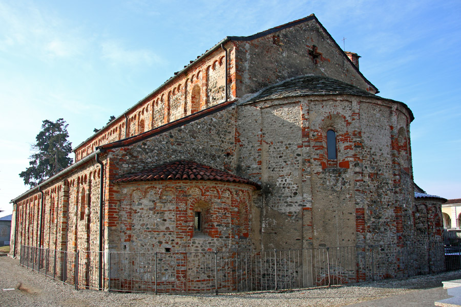 Abside della Pieve di San Michele, nel cimitero di Oleggio